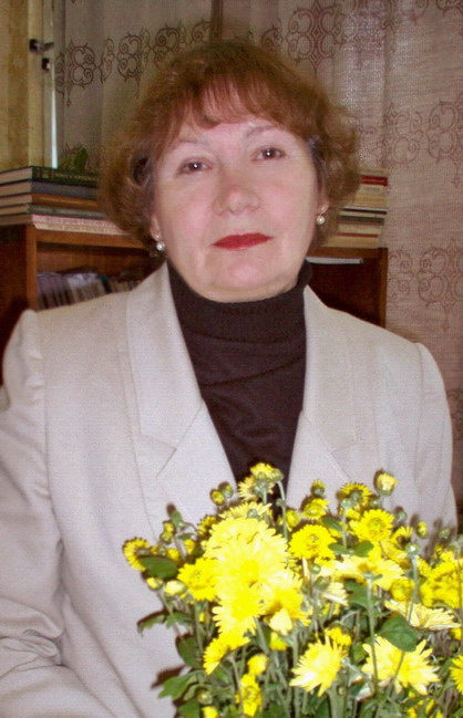 Тамара Мікалаеўна Суша